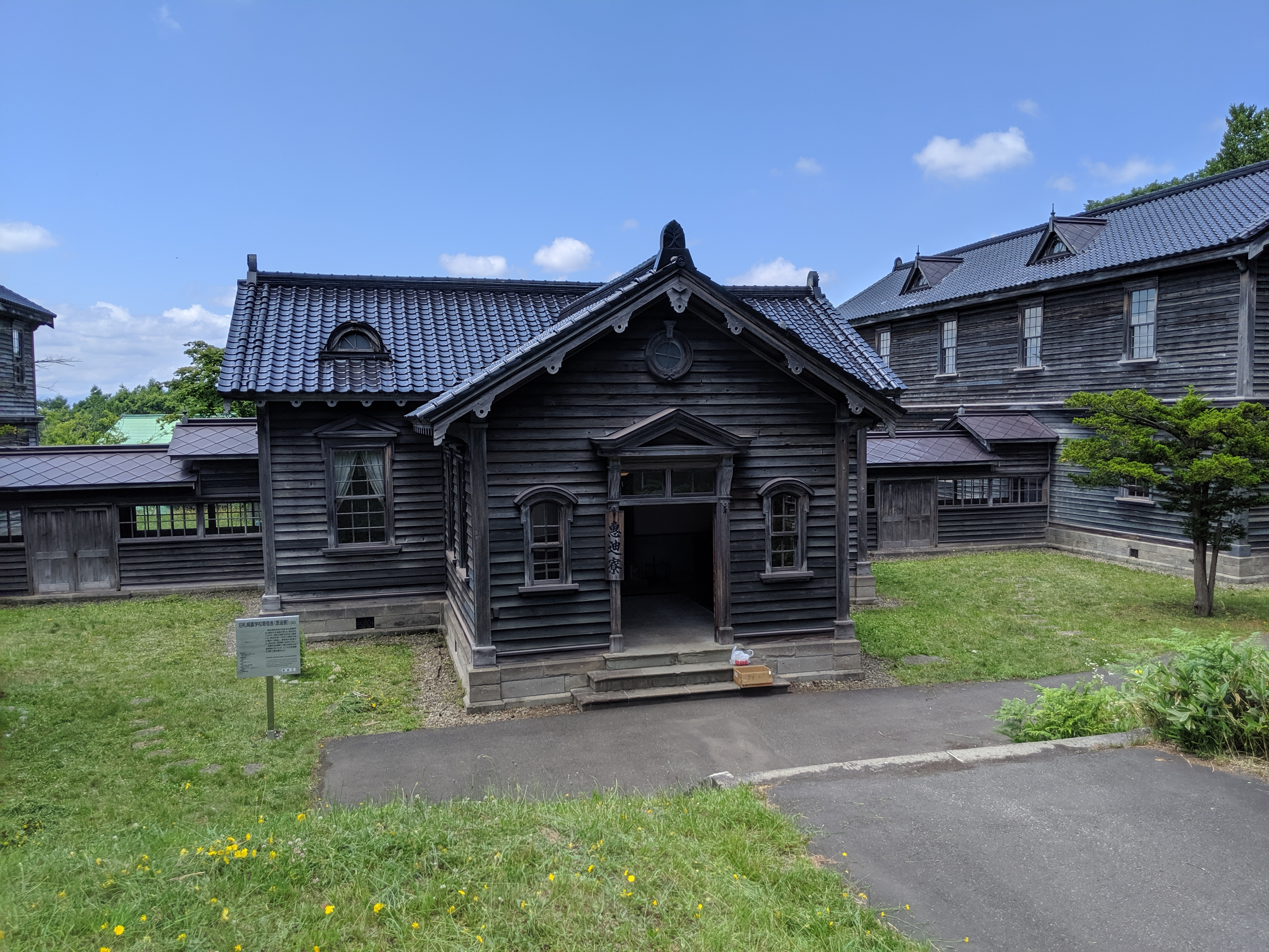 札幌農学校時代に作られ、北海道大学に移行したあとも利用された学生寄宿舎「恵迪寮」を北海道開拓の村へ移設し、展示されている建物。